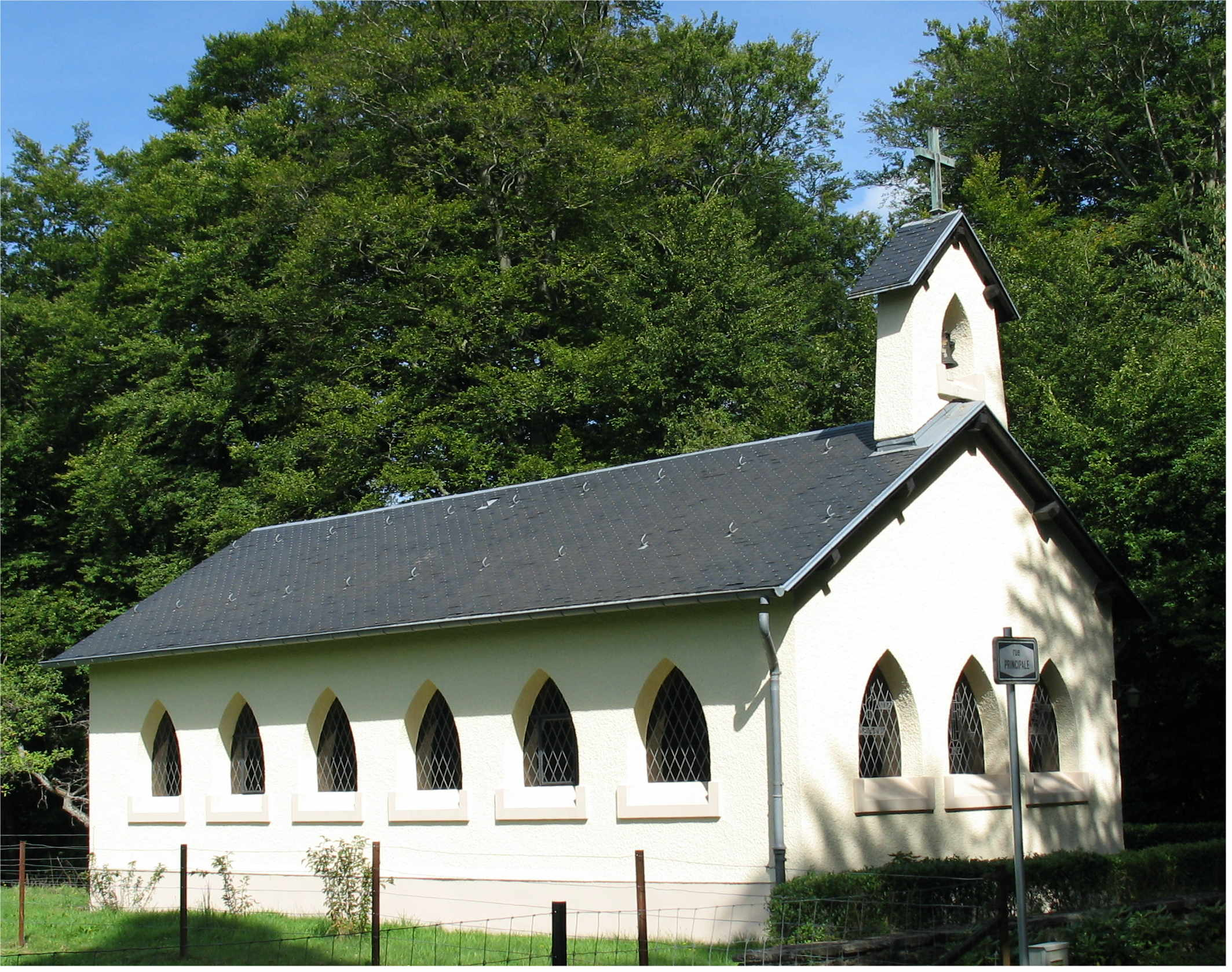 D'Scoutekapell um Neihaischen.